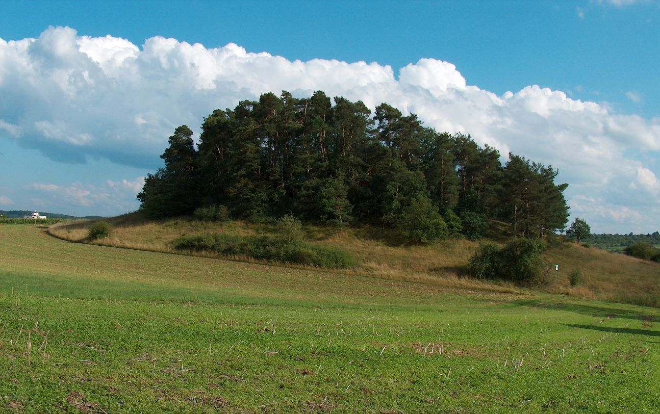 Naturdenkmal Ratberg in Magstadt (Aufgenommen aus Richtung Warmbronn)